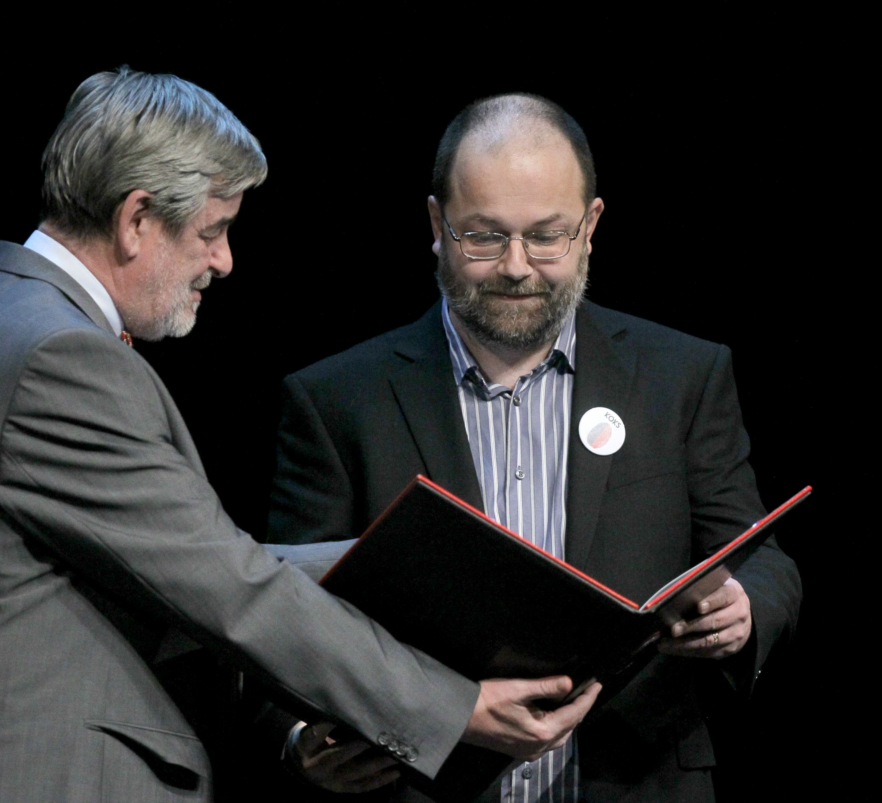 Državna proslava ob Prešernovem dnevu